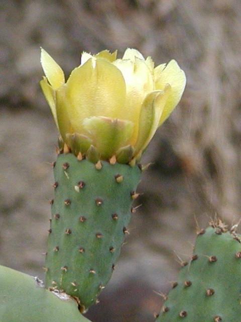 Blüte eines Feigenkaktus